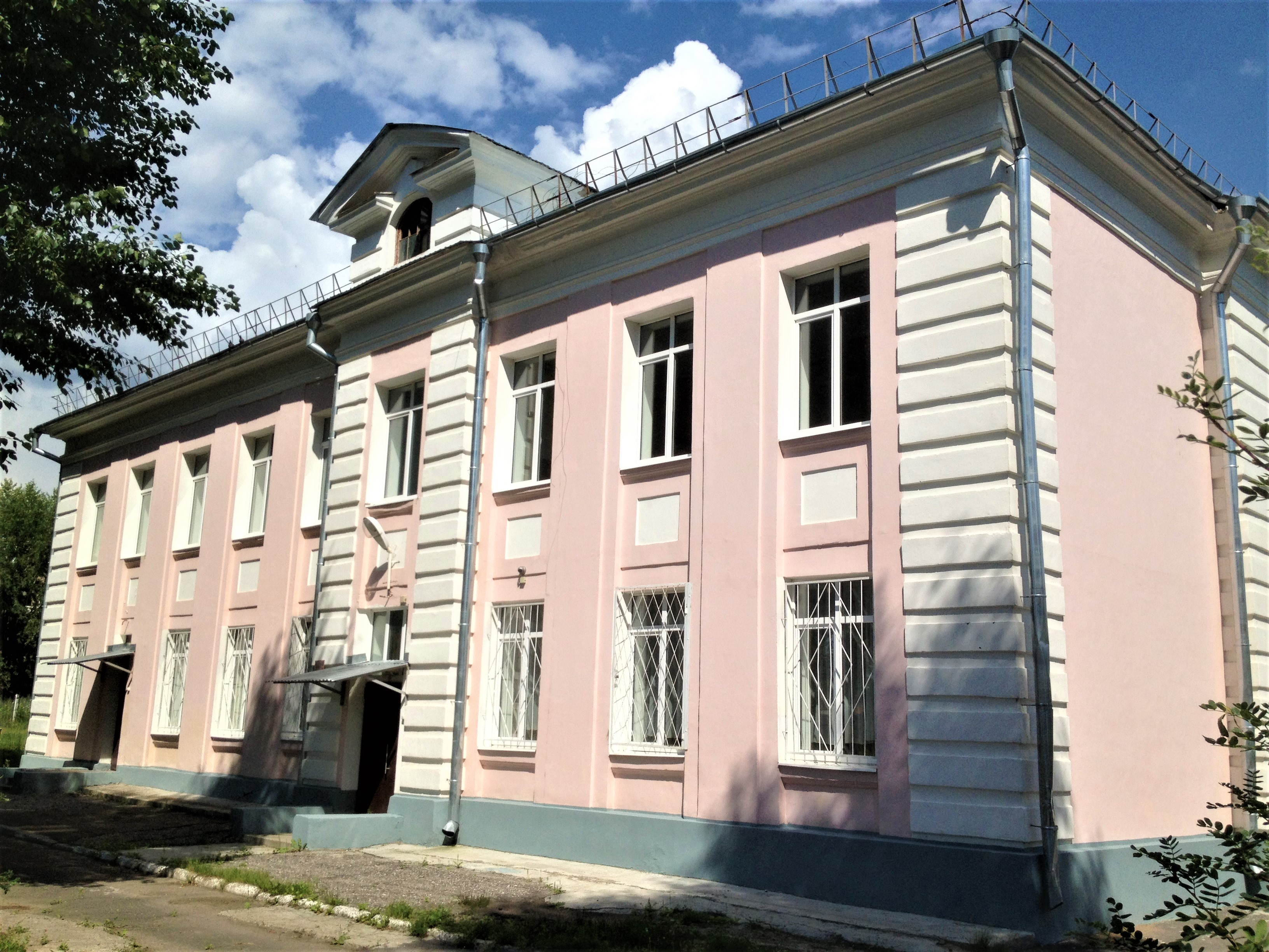 ГБОУ «Казанская школа-интернат № 1 для детей с ограниченными возможностями здоровья» (г. Казань, ул. Тимирязева, д. 3).